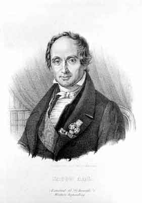 Porträt von Jacob Aall, aufgenommen um 1839